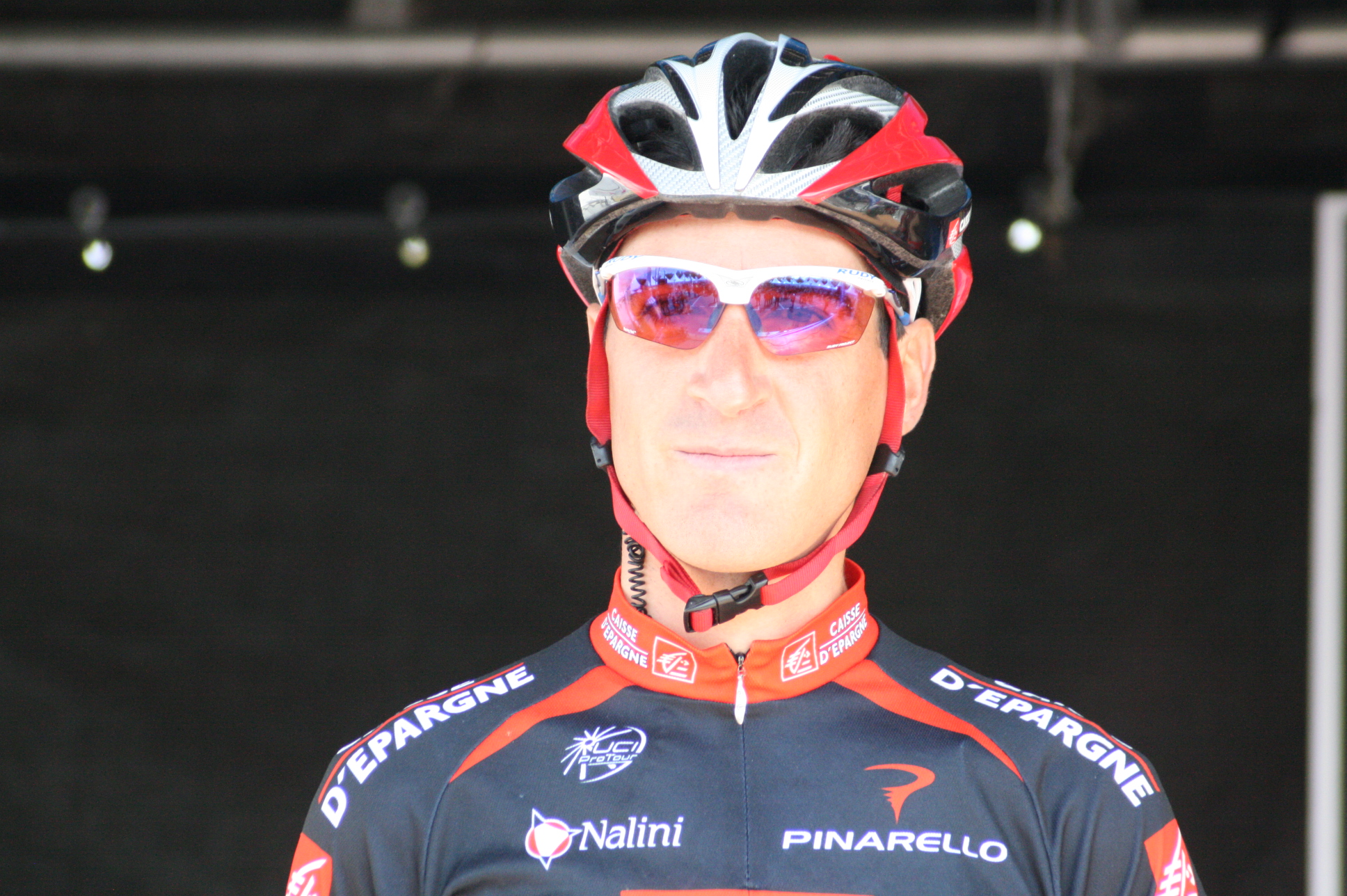 Francisco Pérez Sánchez, lors de la présentation des équipes des 4 jours de Dunkerque 2010